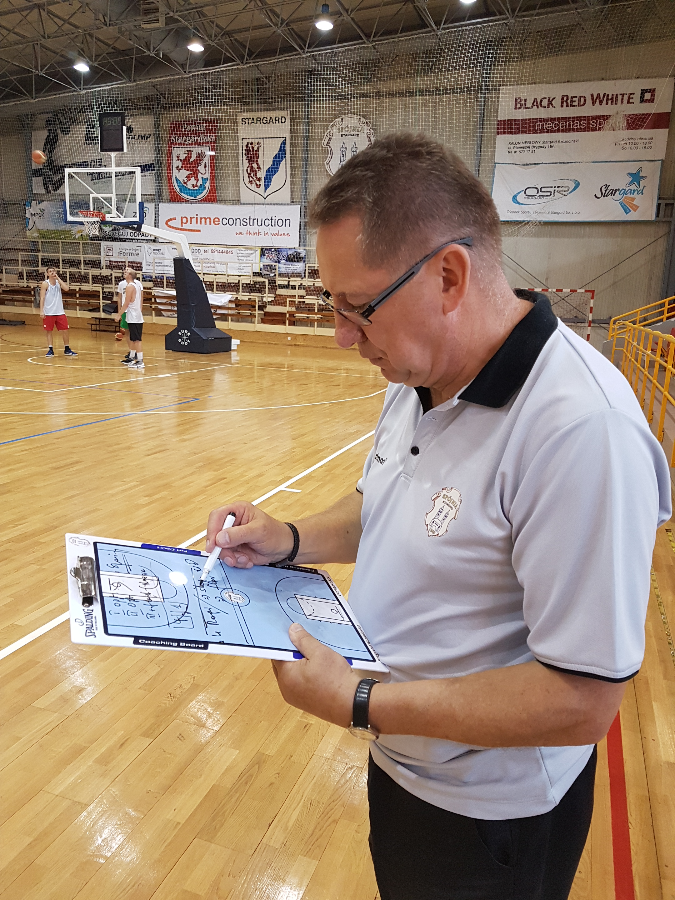 Krzysztof Koziorowicz podczas treningu